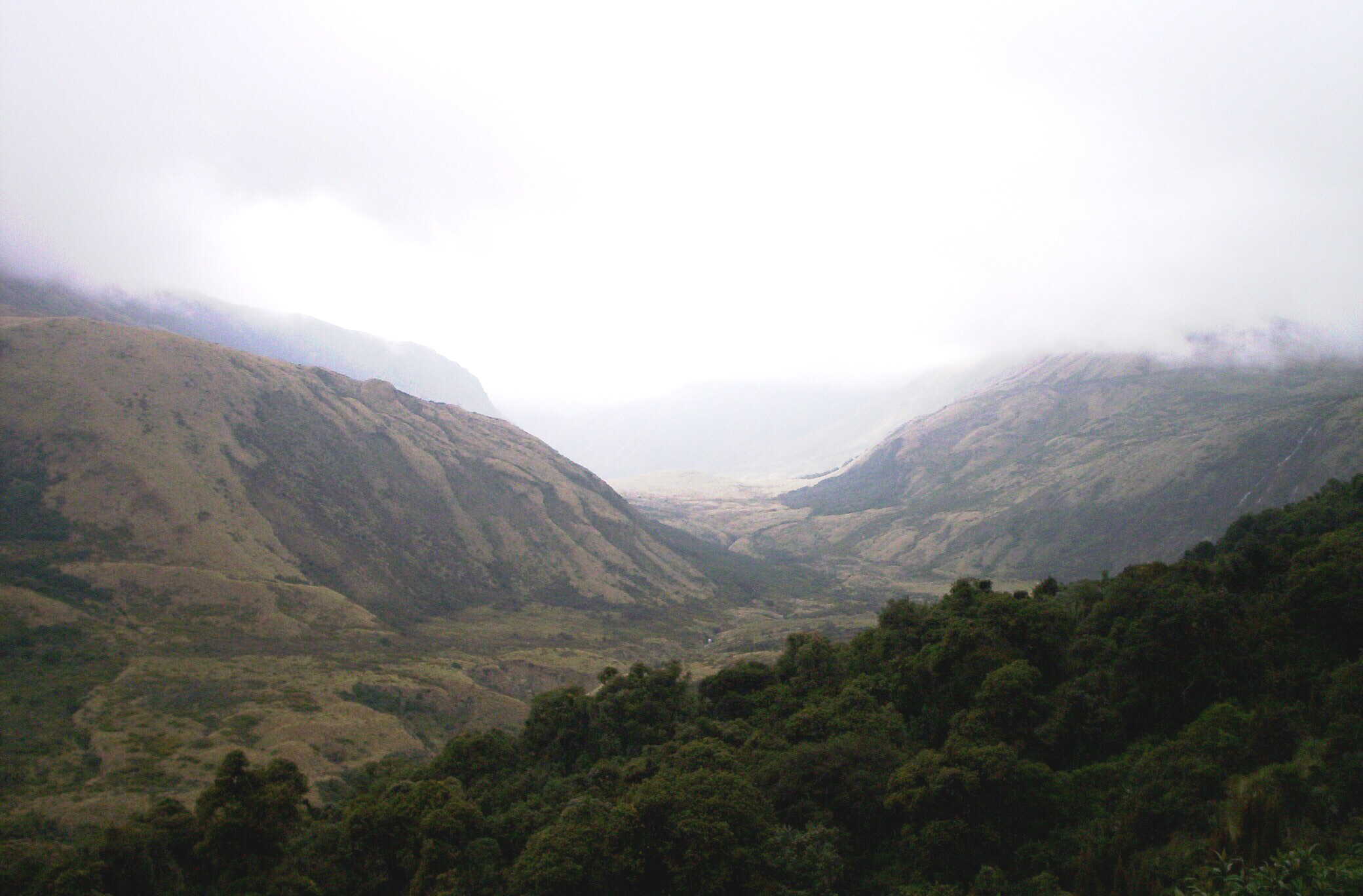 Páramo húmedo cerca de Oyacachi, Reserva Ecológica cayambe Coca, Napo Ecuador